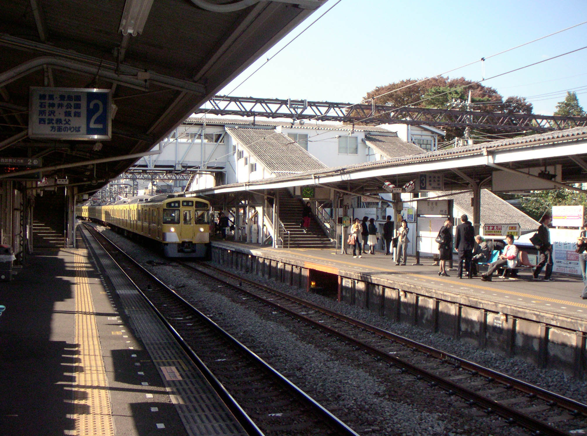 Ekoda Station, Seibu Ikebukuro Line, Tokyo